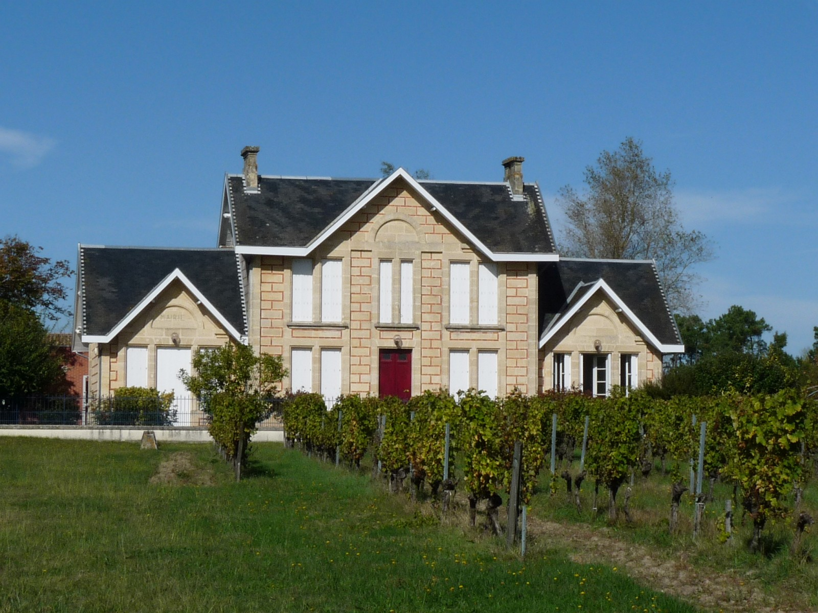 Mairie de Saint-Vivien-de-Blaye, Gironde, France